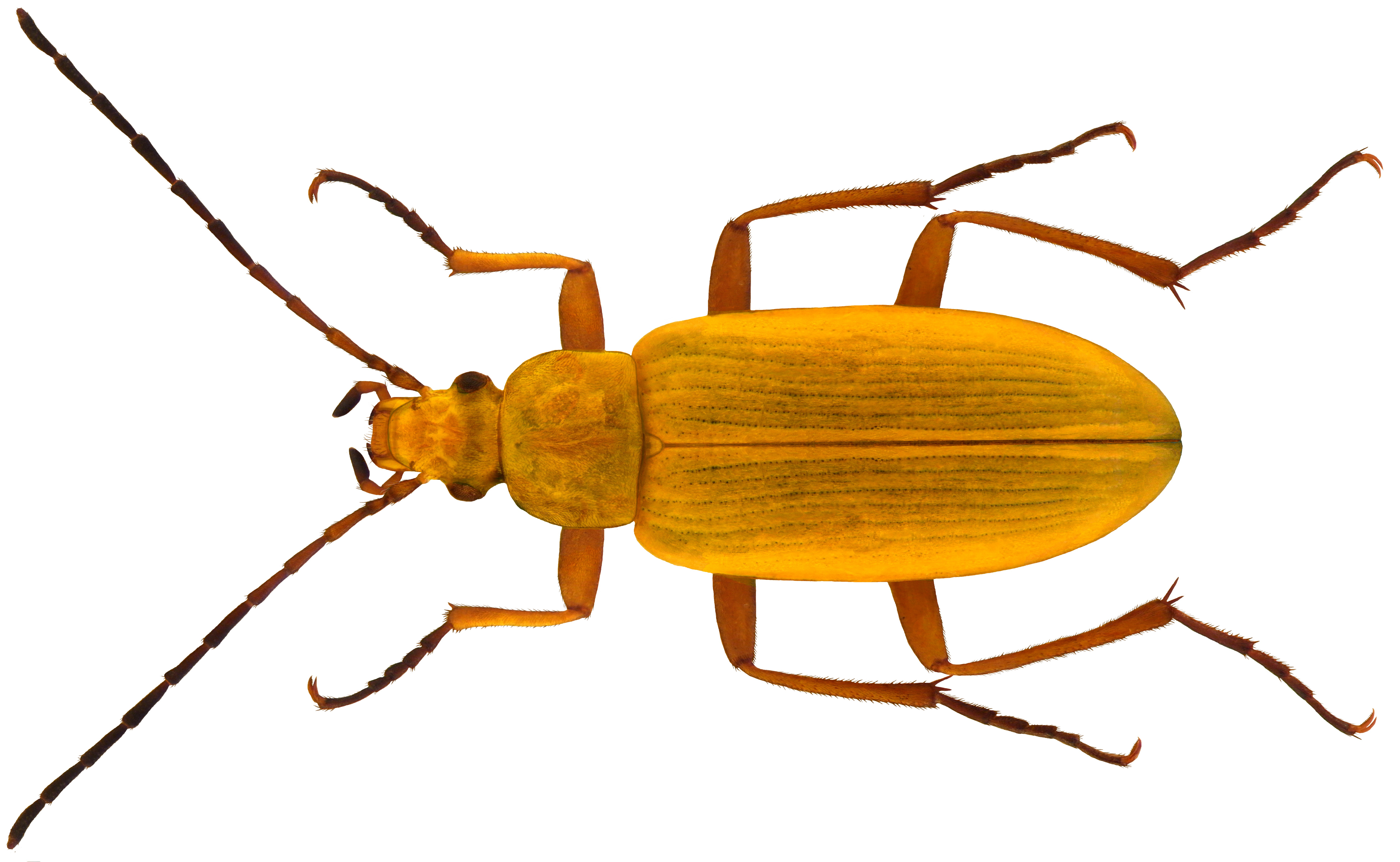 Familie: Alleculidae Groesse: 7-9 mm Verbreitung: Europa bis Sibirien Ökologie: wärmeliebend, vorwiegend auf Umbelliferen Fundort: Helvetia, Graubünden, Ilanz leg.det. U.Schmidt, 2003 Foto: U.Schmidt, 2010